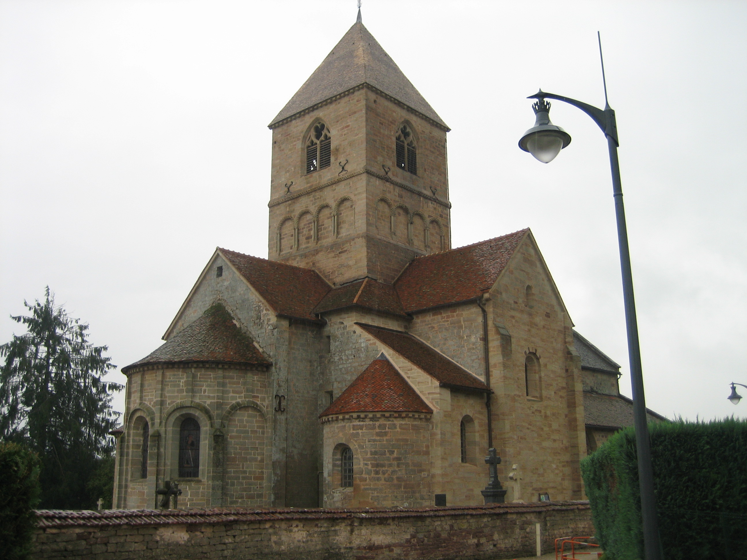 Vue de l'église Notre-Dame de Relanges, Vosges, France. .